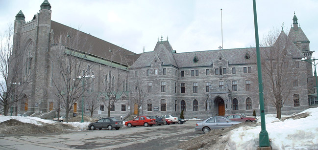 Cathédrale Saint-Michel de Sherbrooke, Québec, Canada.